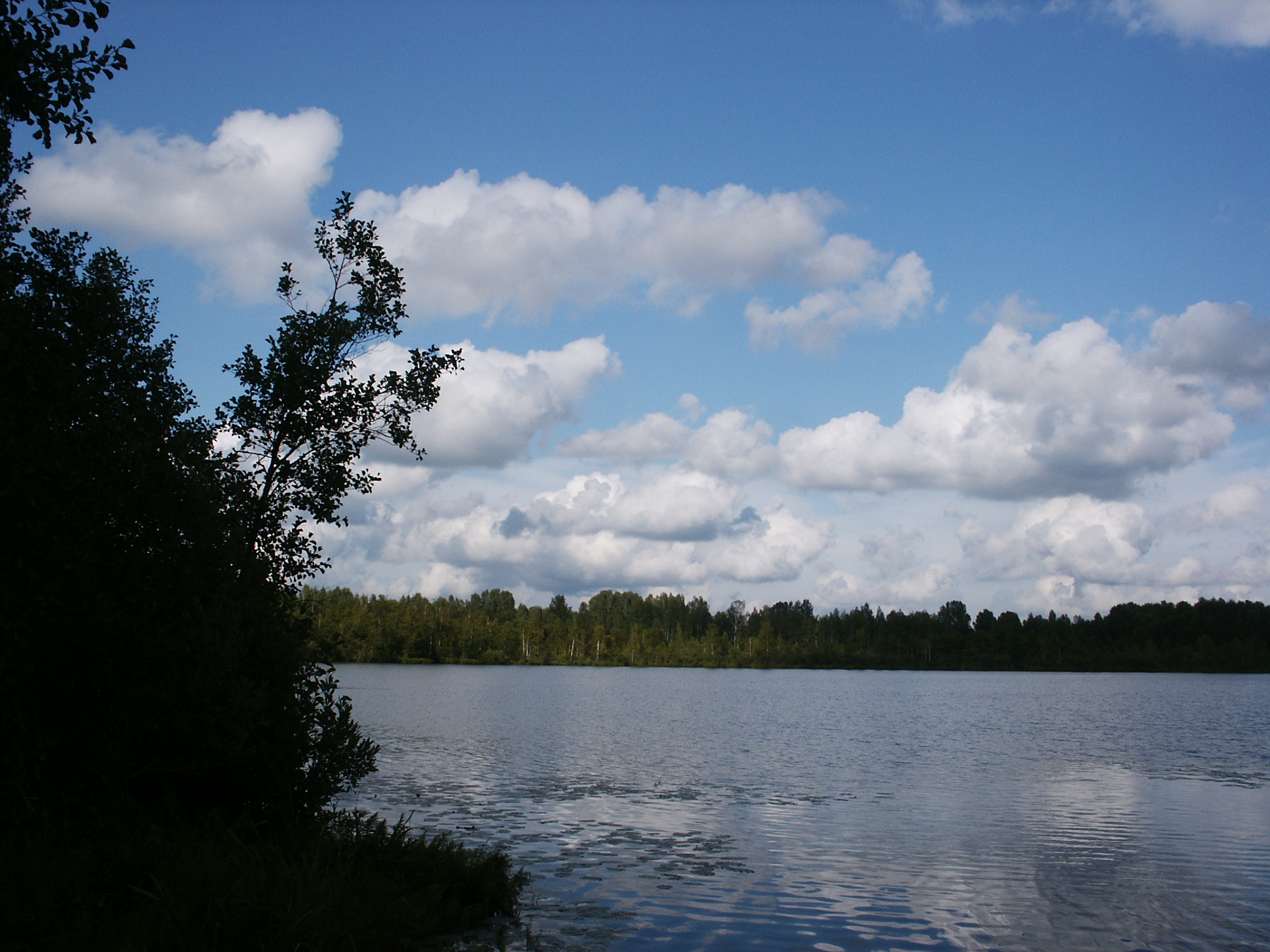 Фотография озера Светлояр. 2006 год, лето.